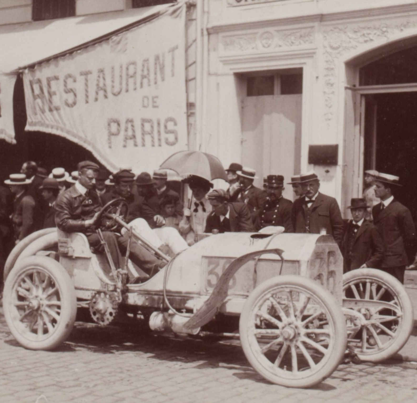 [Collection Jules Beau. Photographie sportive] : T. 21. AnnÃ©e 1903 / Jules Beau : F. 43v. [Paris - Bordeaux]